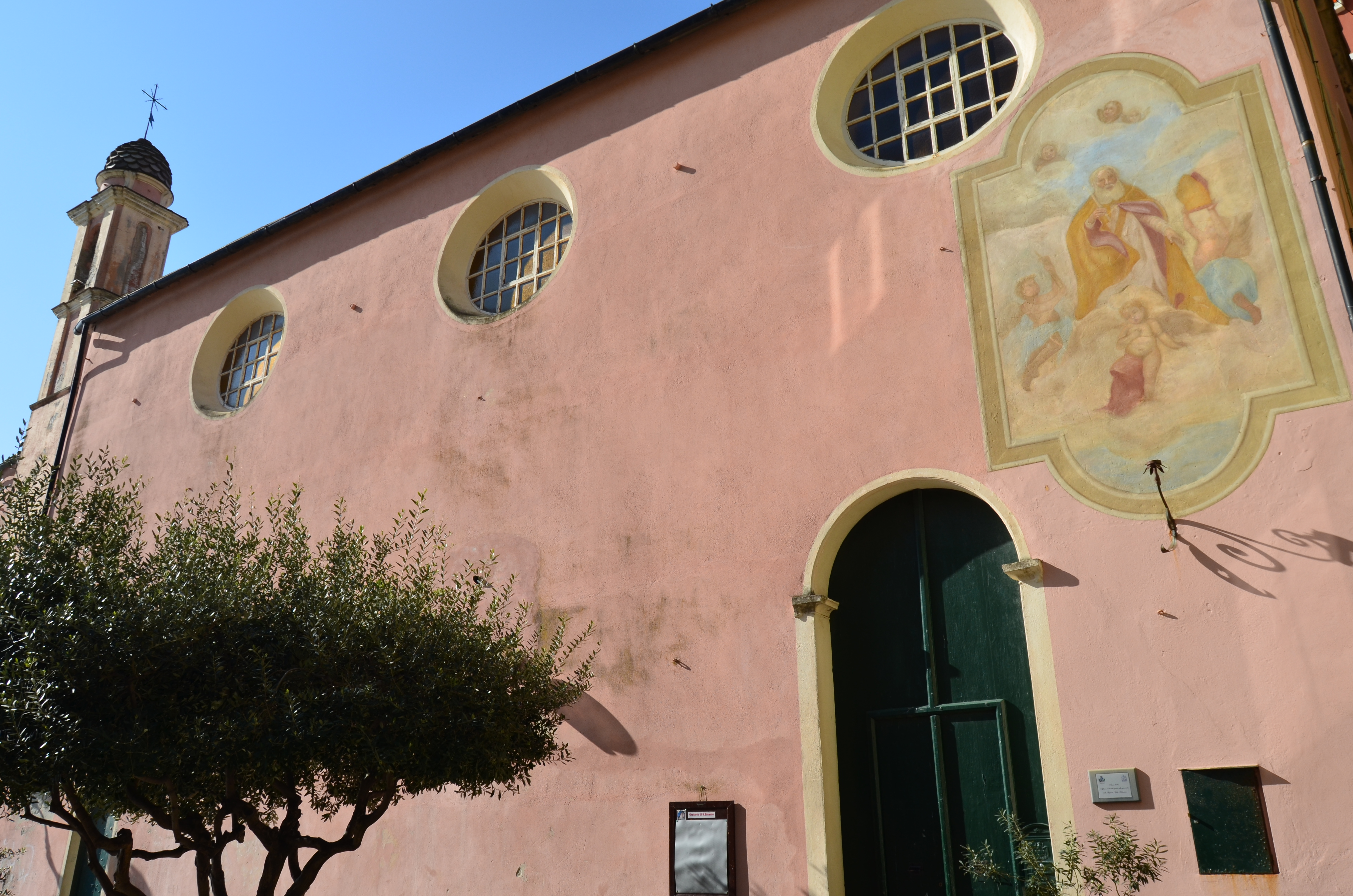 L'oratorio di Sant'Erasmo, Sori, Liguria, Italia